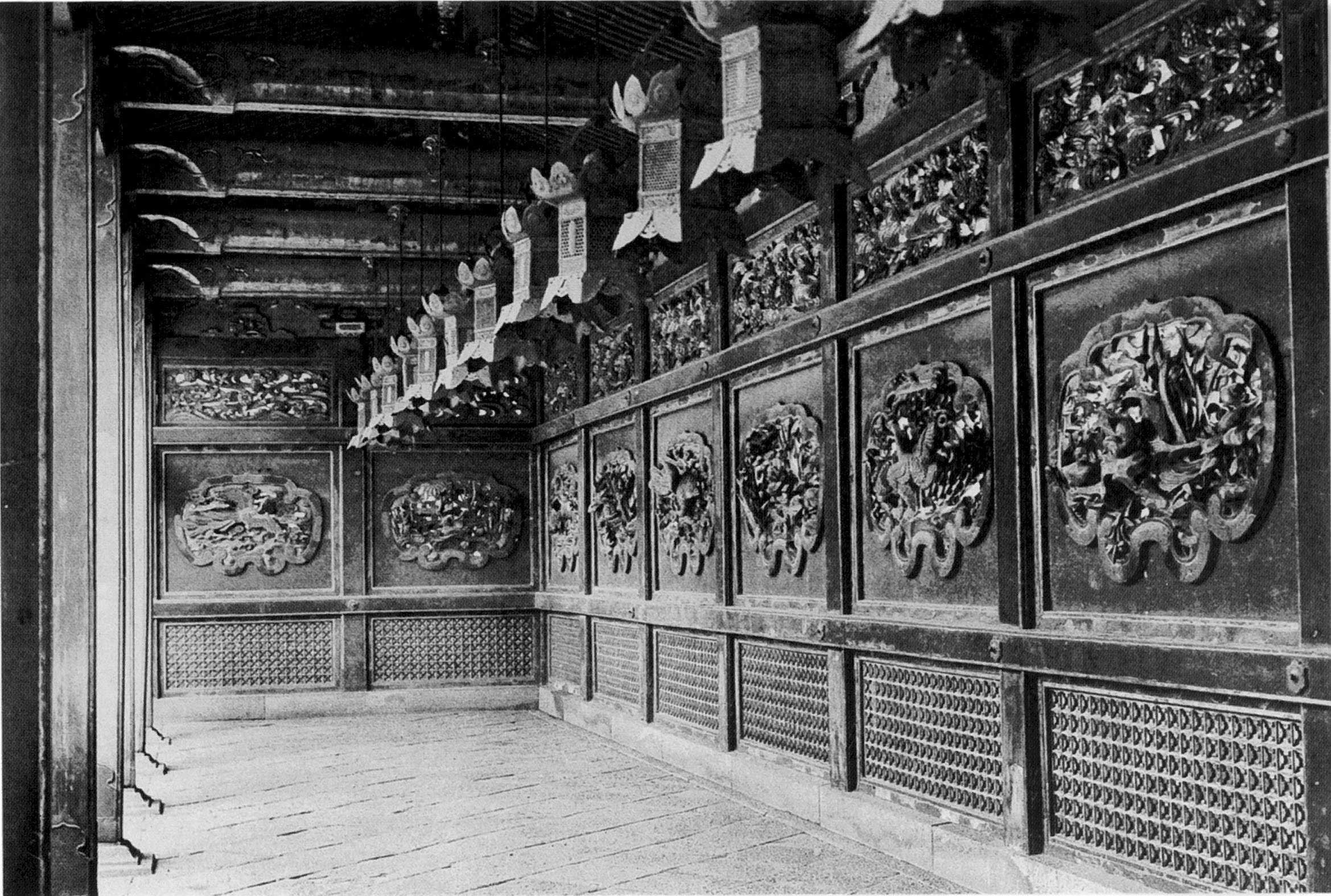 増上寺 文昭院殿 (6代家宣公) 霊廟 左右廊内部 1713年造営、1945年焼失。旧 国宝。